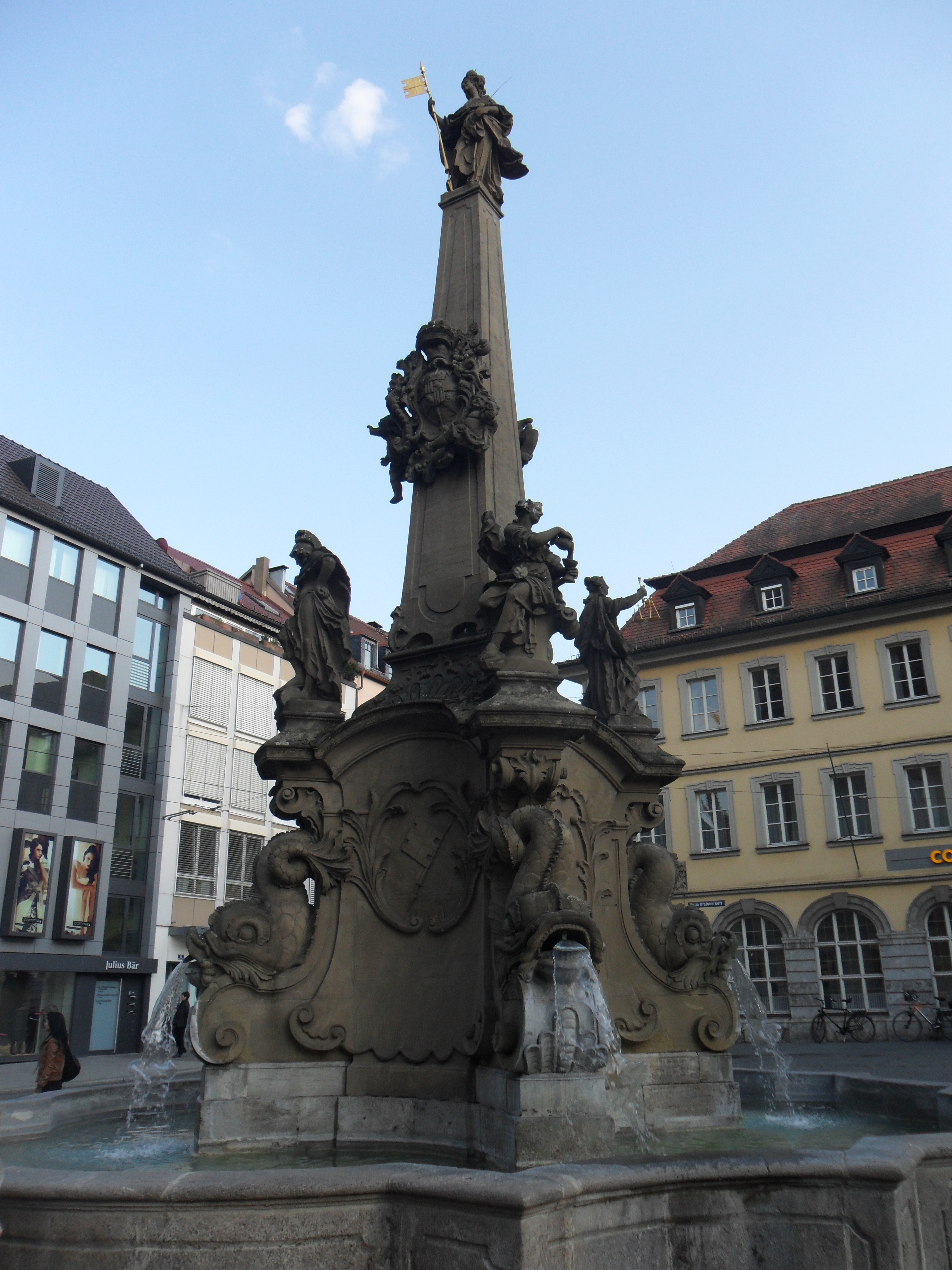 Siehe Bildtitel